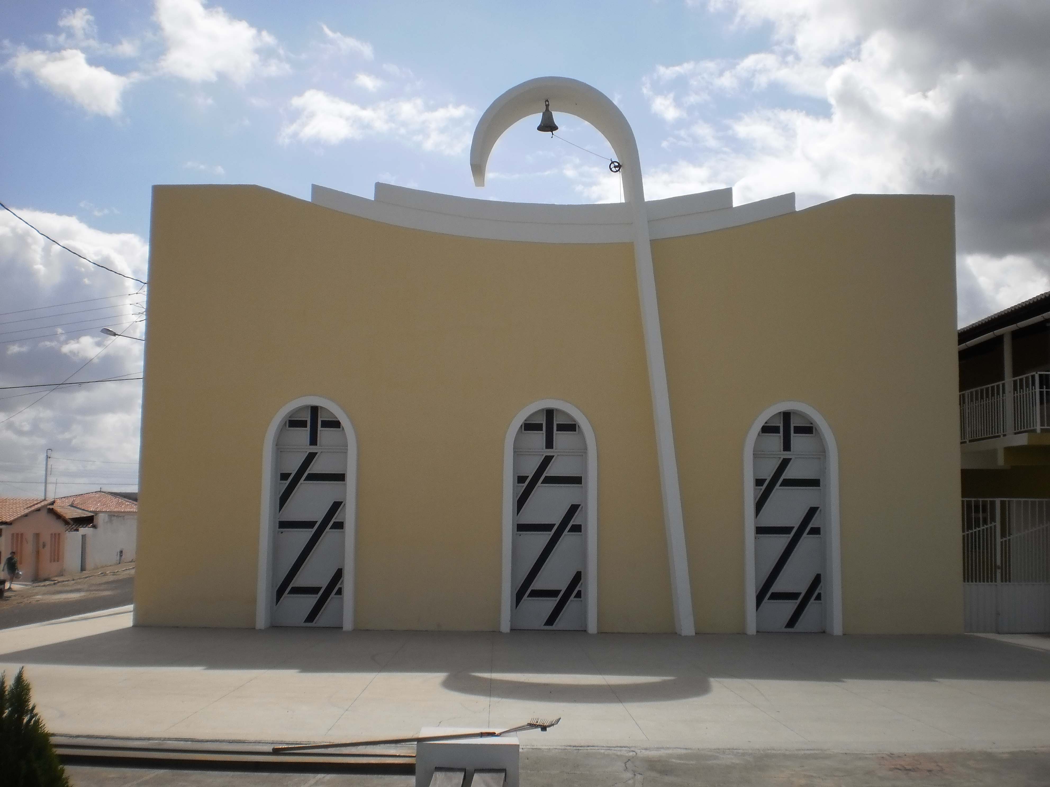 Capela Nossa Senhora das Graças, pertencente à Paróquia de Nossa Senhora das Dores de Itaú, em Severiano Melo, Rio Grande do Norte, Brasil.